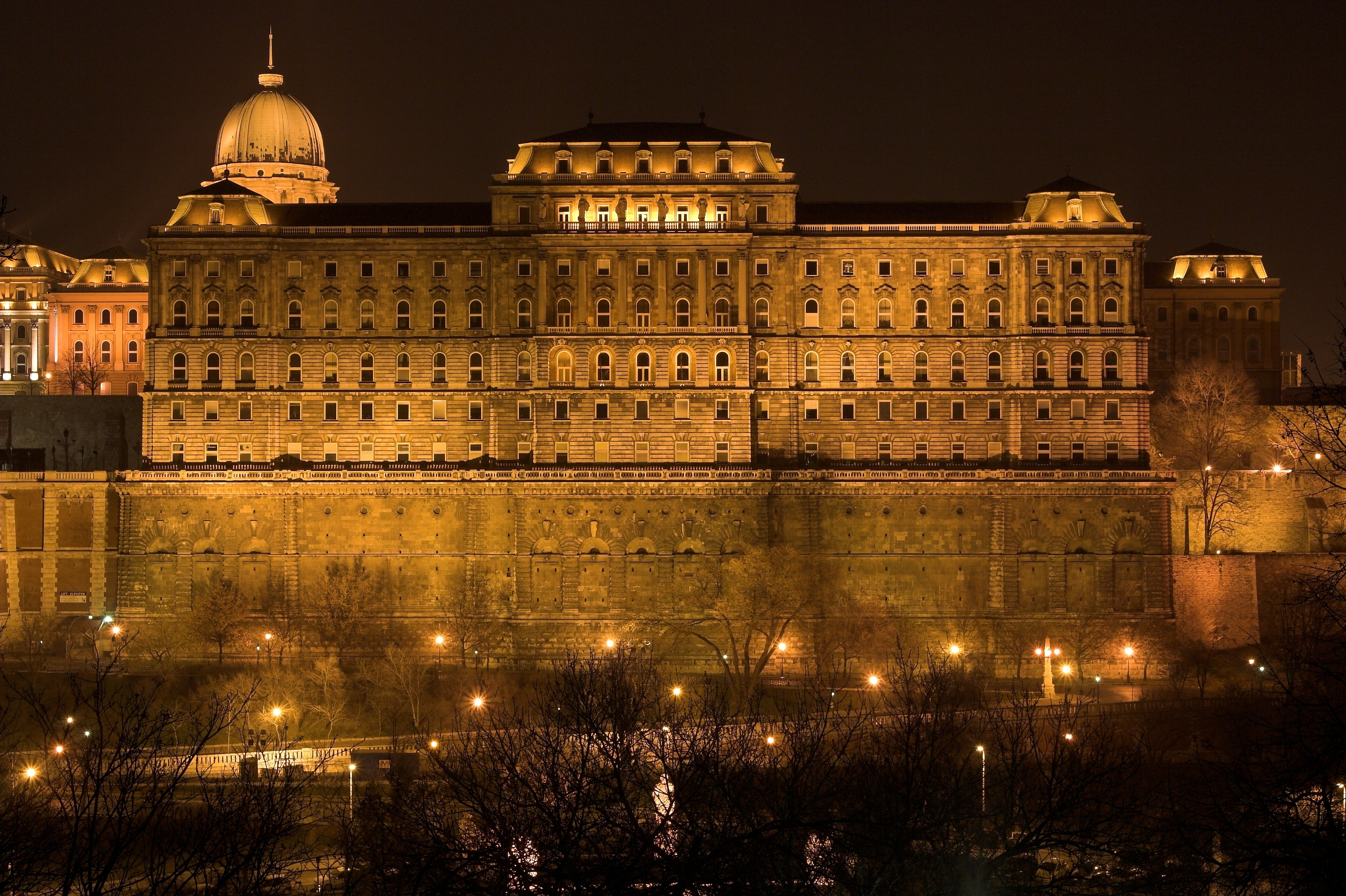 Az Országos Széchényi Könyvtár Budapesten.